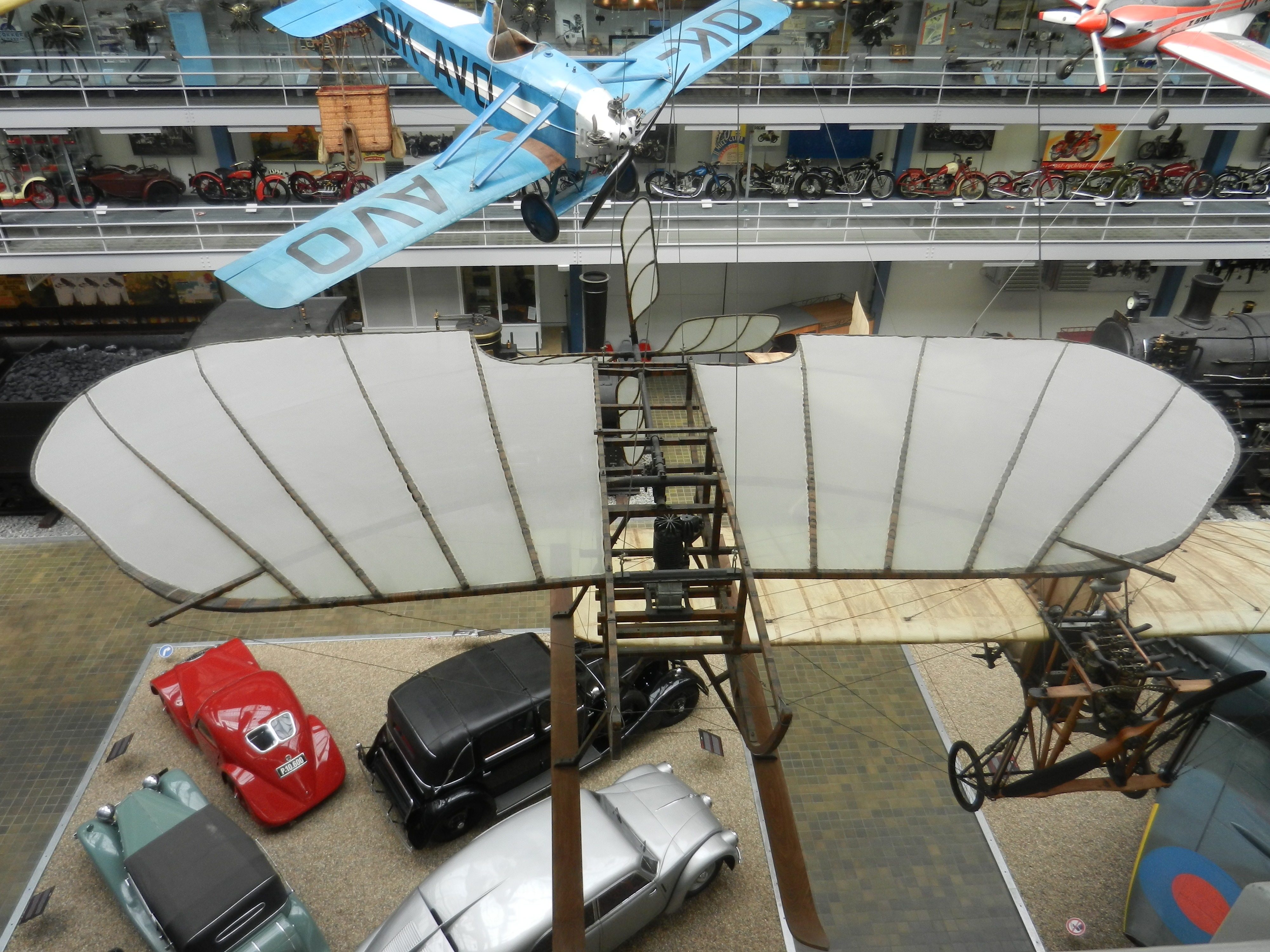 Razstavljeno letalo v Tehničnem muzeju v Pragi, ki je imelo namesto koles za pristajanje smuči.